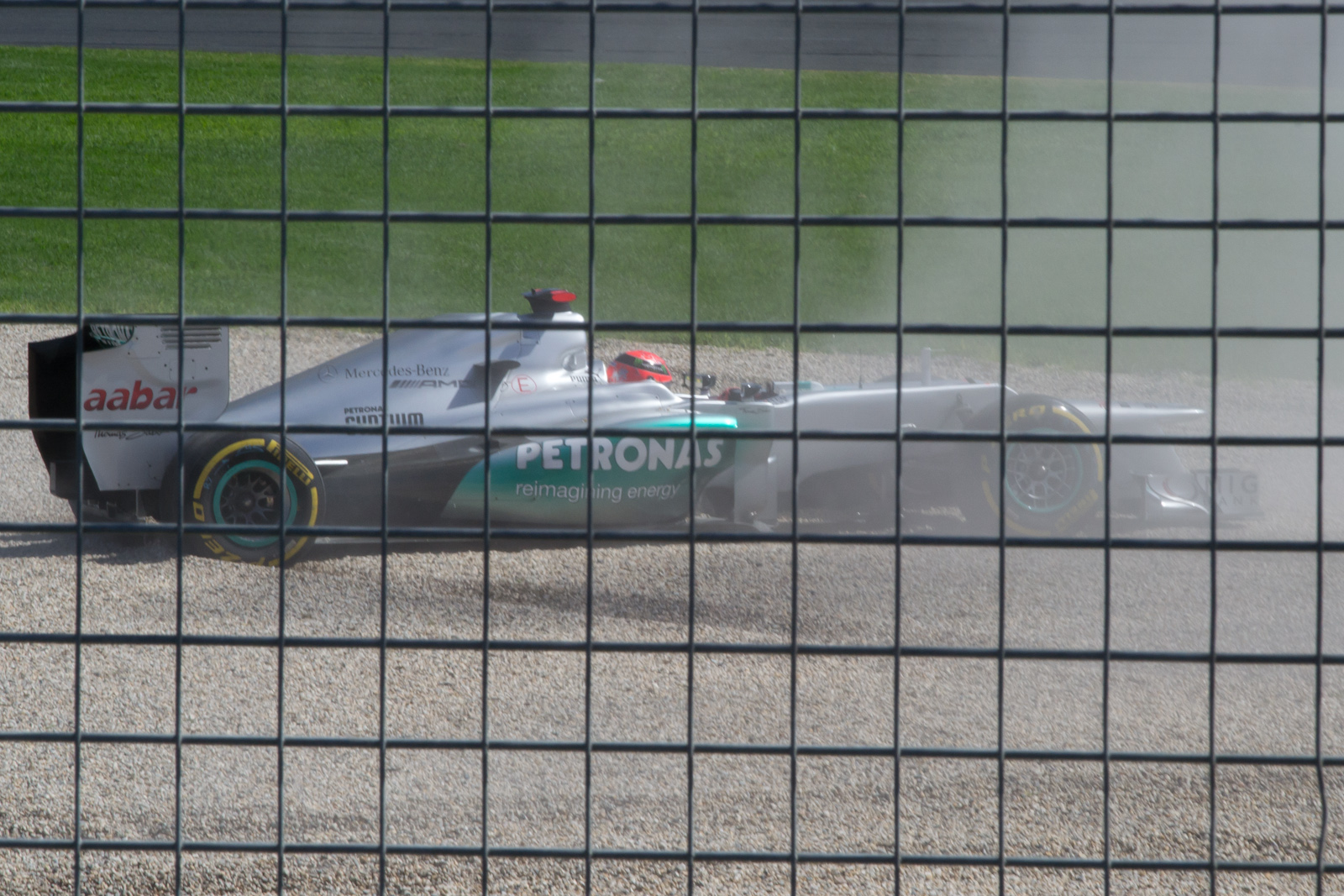 2012 Australian Grand Prix — Michael Schumacher